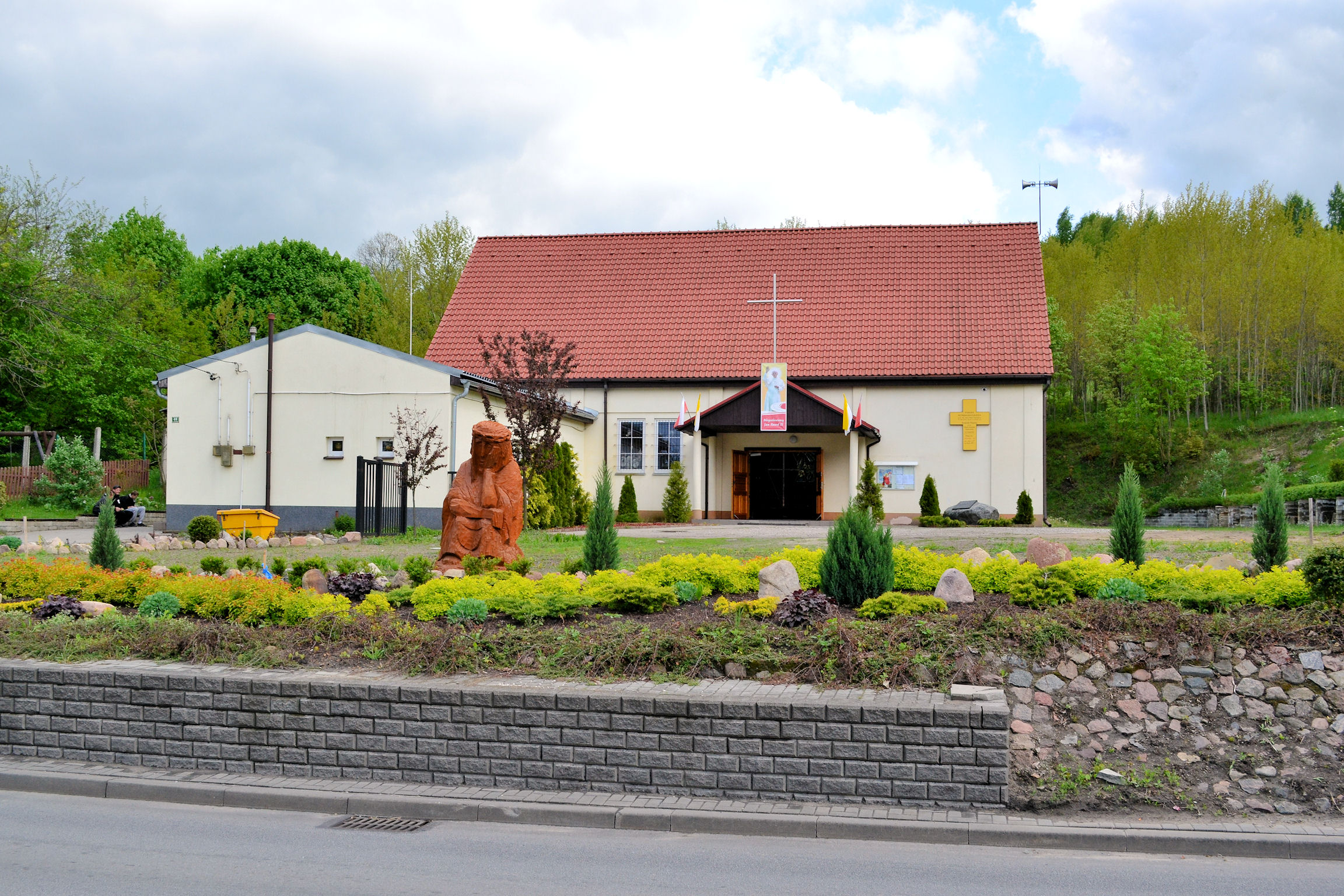 Czepino